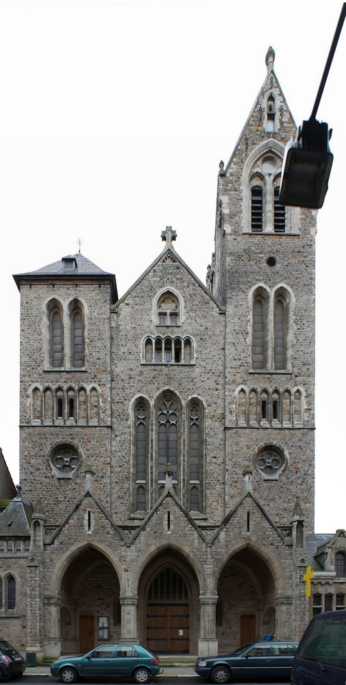 Voorgevel van de Sint-Albertuskerk te Schaarbeek,gebouwd door architect Edmond Serneels. Bewerkt fotomateriaal.